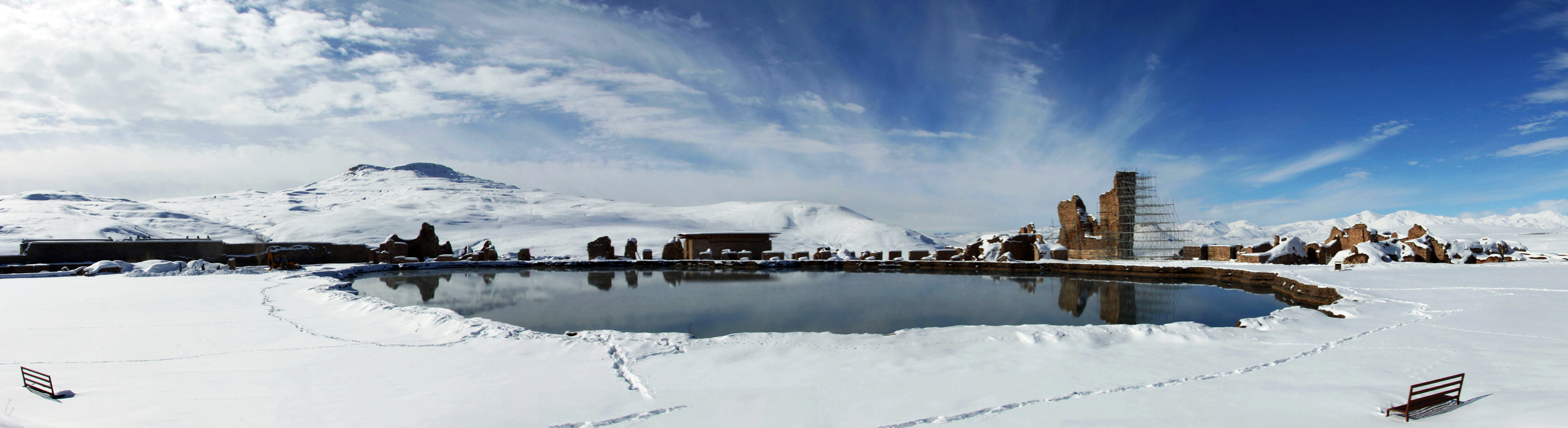 تخت سلیمان در زمستان